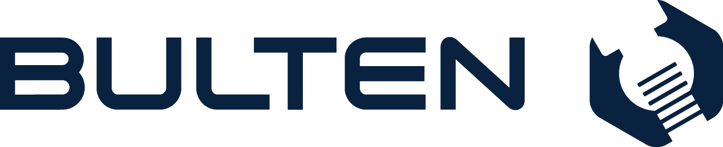 Bulten AB logo